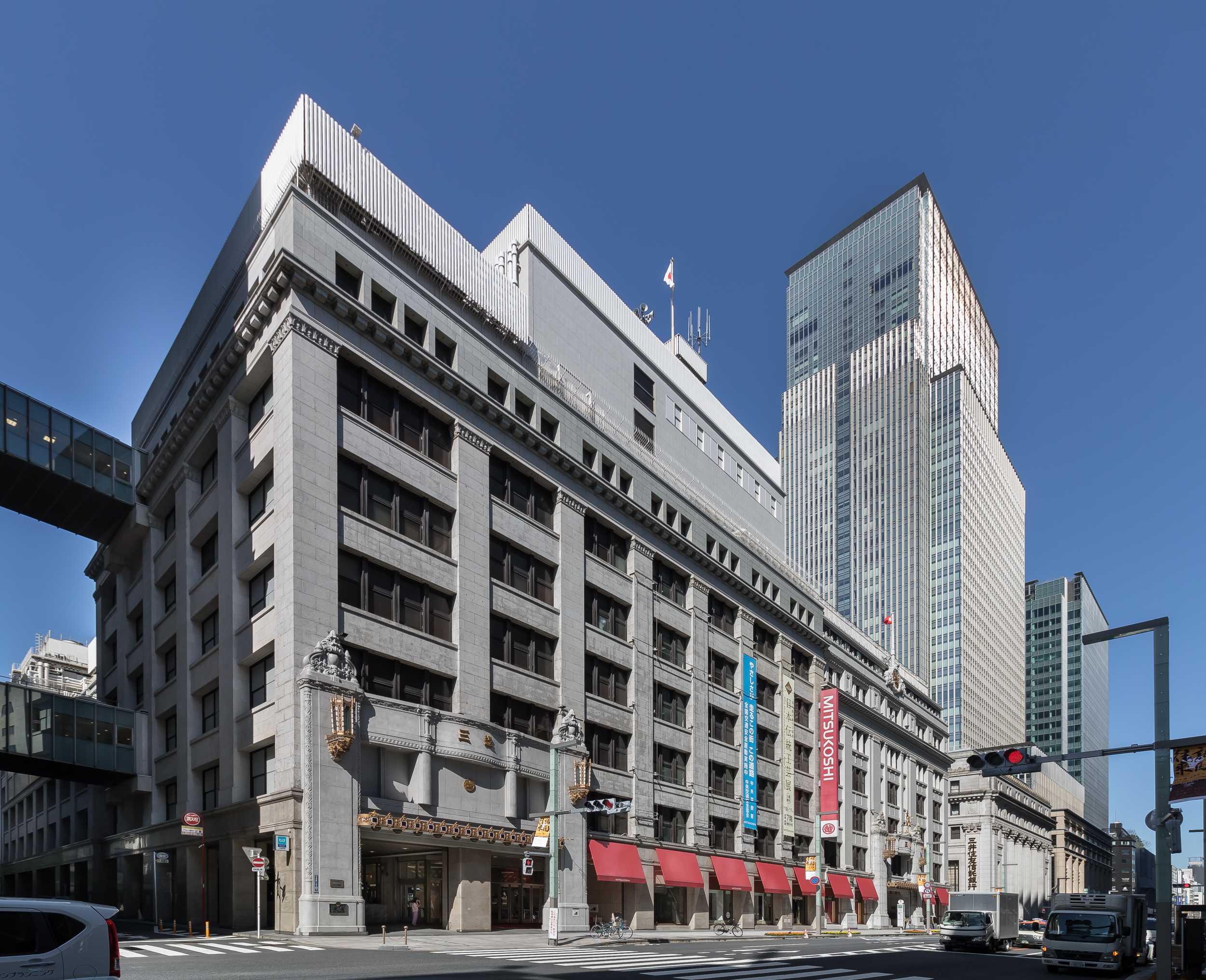 三越日本橋本店本館（重要文化財）。横河工務所設計（1914年）。